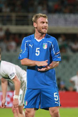 Il giocatore italiano durante Italia-Slovenia di qualificazione agli Europei 2012